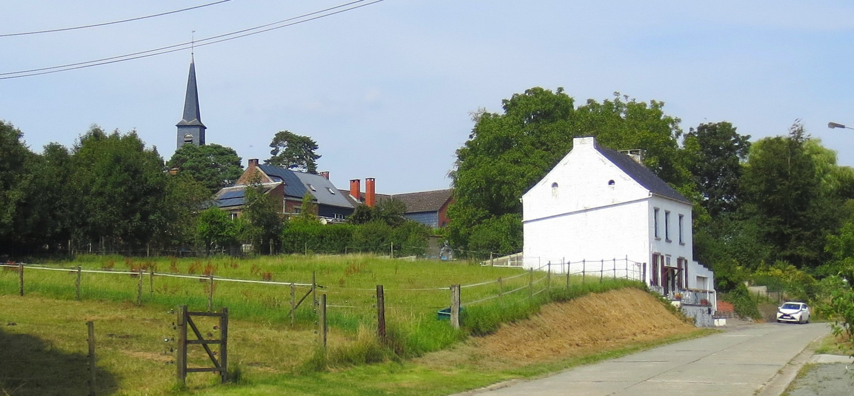 Fouleng